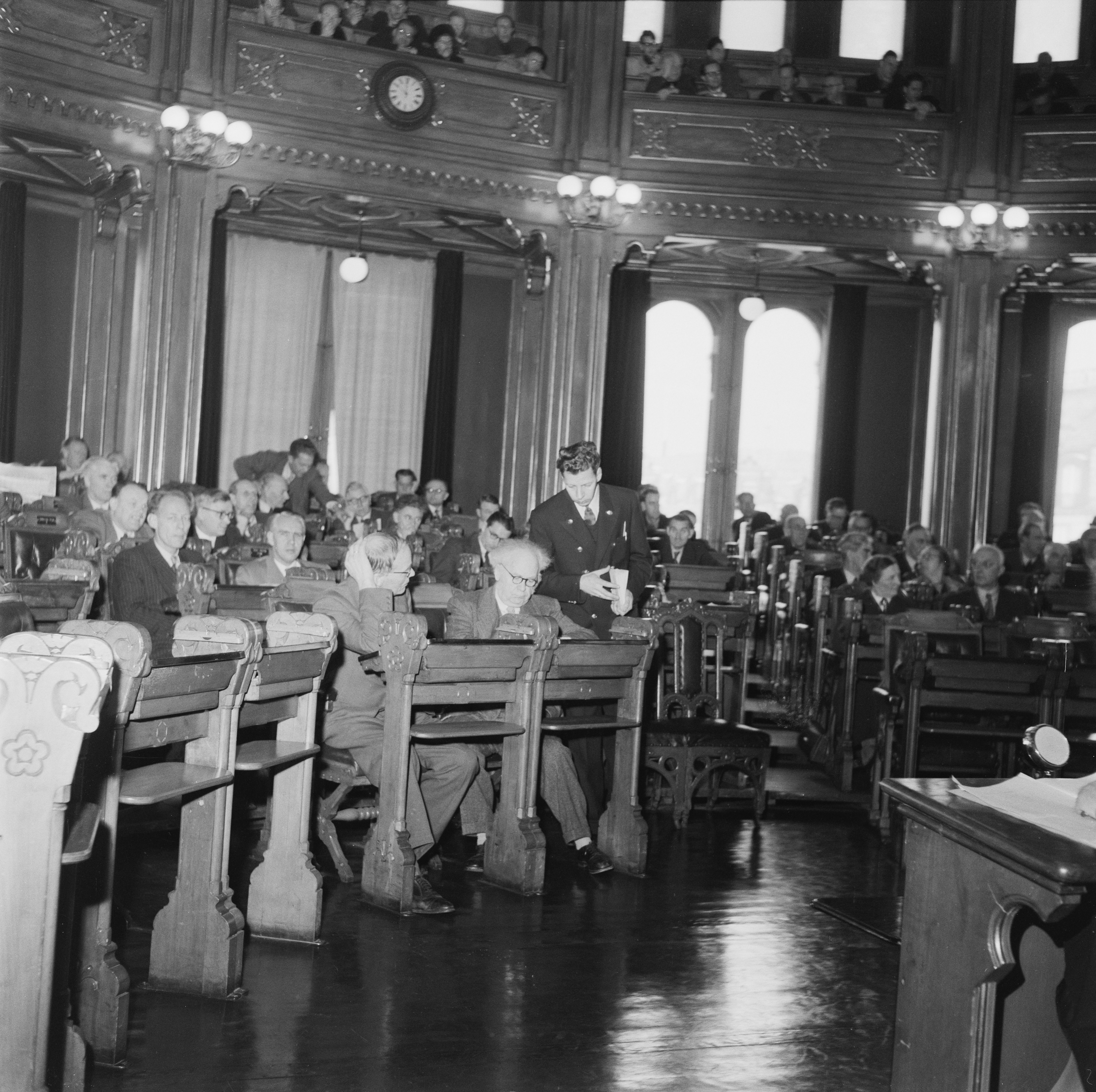 Bildet er hentet fra Arkivverket. Stortinget 1954. NÅ nr. 3, 1954. Arkivinstitusjon : Riksarkivet Arkivnavn : Billedbladet NÅ Sted : Norge, Oslo, Oslo, Stortinget Emneord: Stortinget, Menn Avbildet: Jens Haugland, Herman Smitt Ingebretsen, Liv Tomter